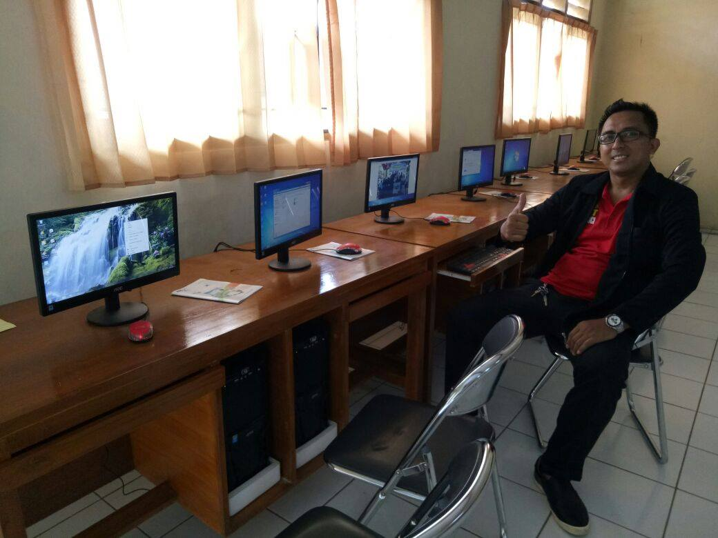 UNBK